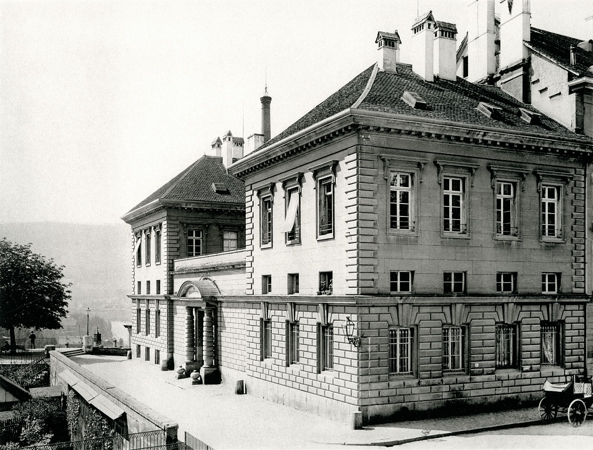 Eidgenössisches Münzgebäude. Erbaut 1790—1793 nach Plänen von J. D. Antoine in Paris, ausgeführt von Vivenel und Osterrieth.